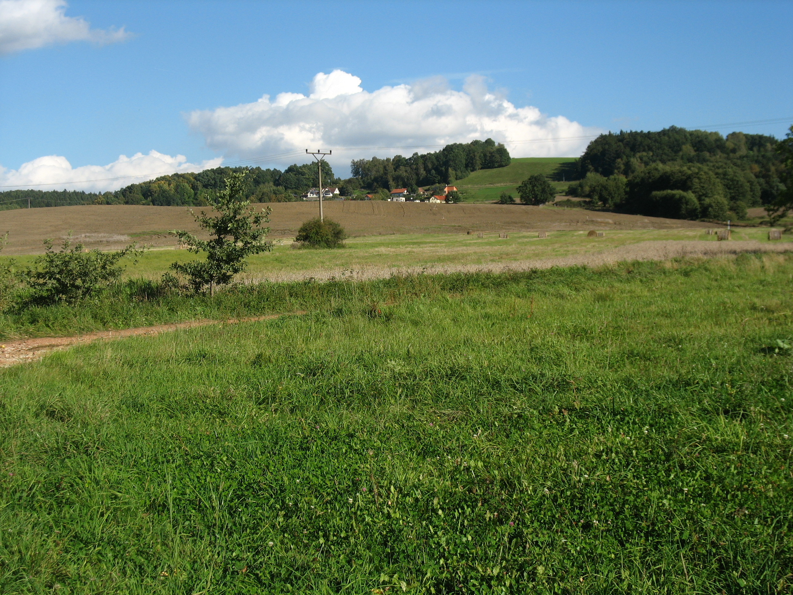 Dlouhý vrch u Dubičného (okres České Budějovice)